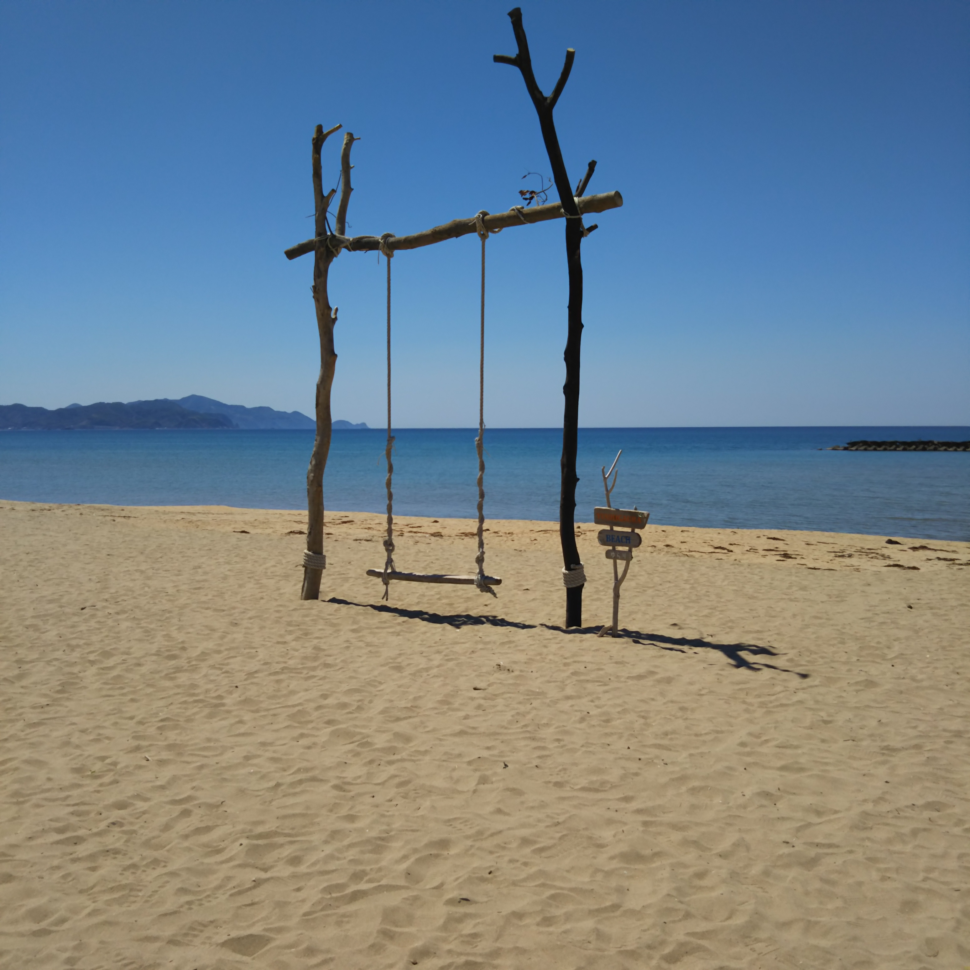 ビーチブランコ ゆらり 夕日ヶ浦（京都府京丹後市網野町浜詰）